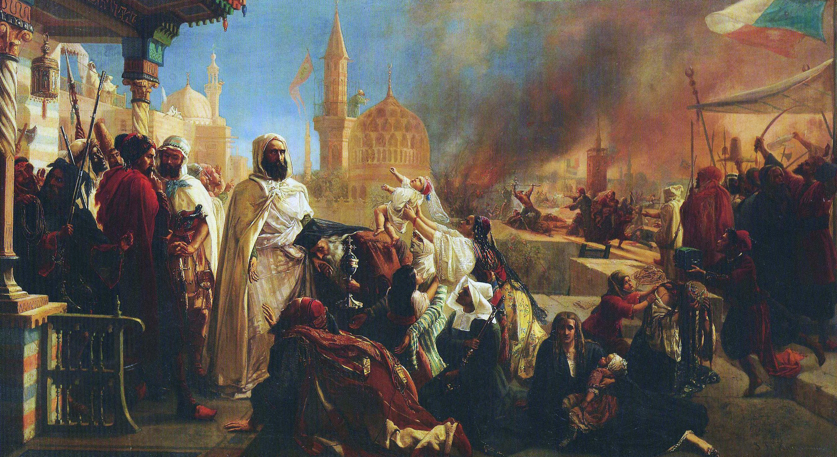 Tableau représentant le chef algérien l'émir Abd-el-Kader, protégeant les chrétiens à Damas en 1860, lors des massacres commis par les Druzes.